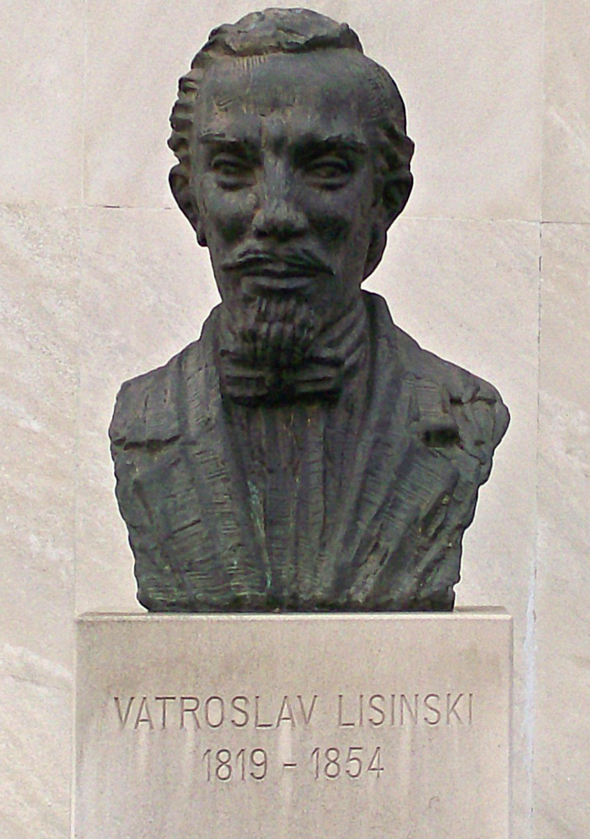 Bista Vatroslava Lisinskog